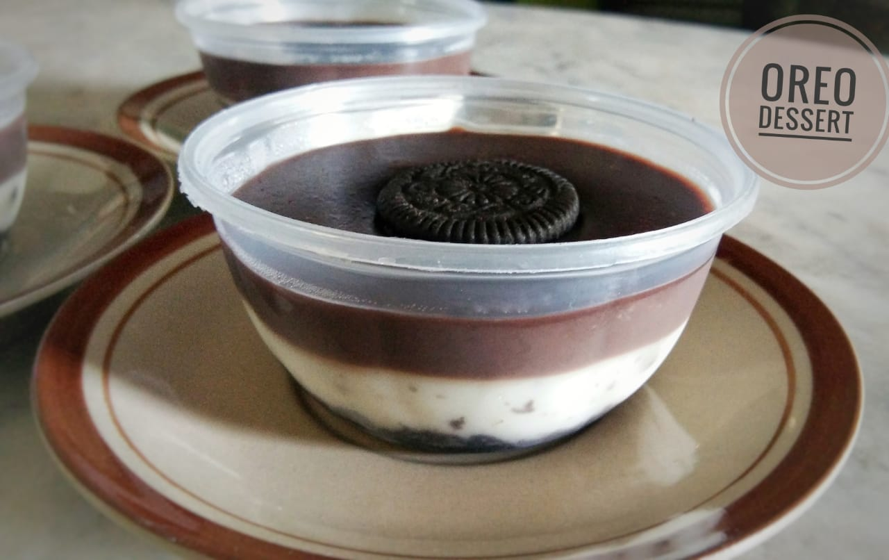 Basa Jawa: Puding oreo utawa ing jaman saiki diarani oreo dessert yaiku panganan kekinian kang bakale saka biskuit oreo banjur nduwure dilapisi macem-macem puding, yaiku puding susu lan puding coklat.